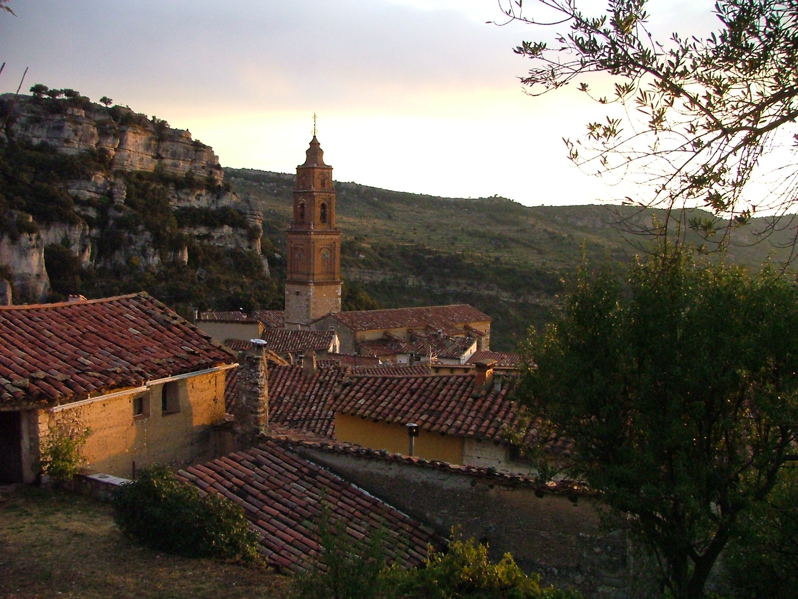 Xiva de Morella (Castellón, España)